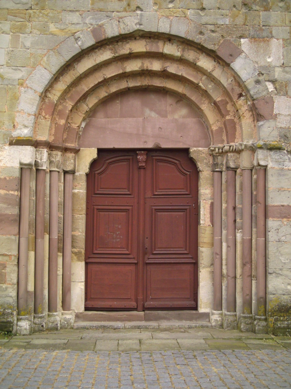 Marsal 57 France, Porche de la collégiale Saint-Léger